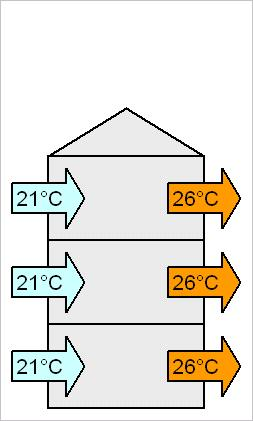 Passive_Nachkühlung_-_Durchzug